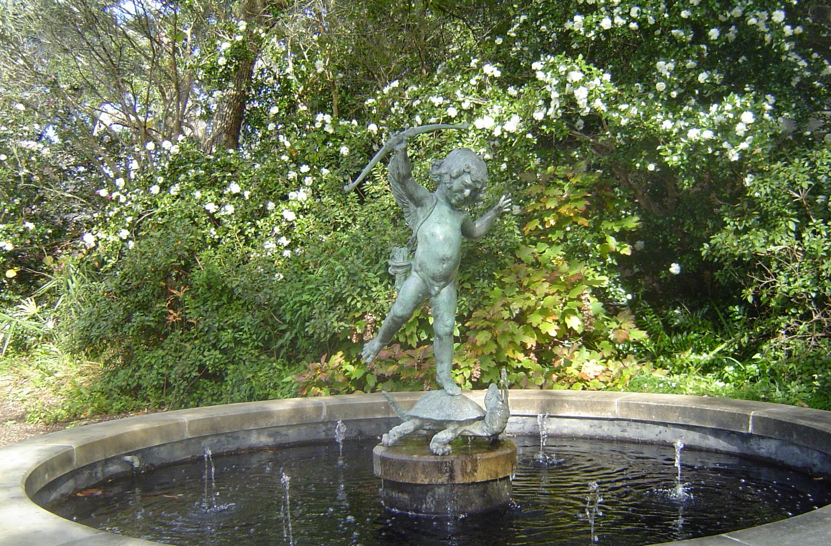 Brookgreen Gardens - in Anne's Garden. Tortoise Fountain, by Janet Scudder.